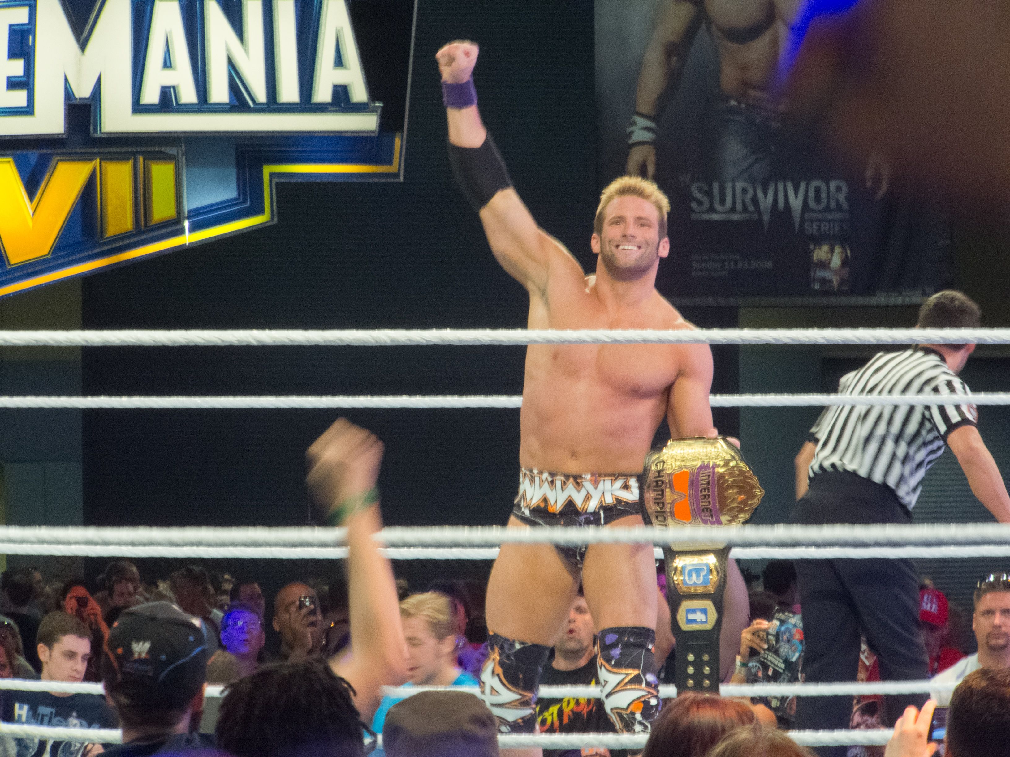 Zack Ryder @ Axxess